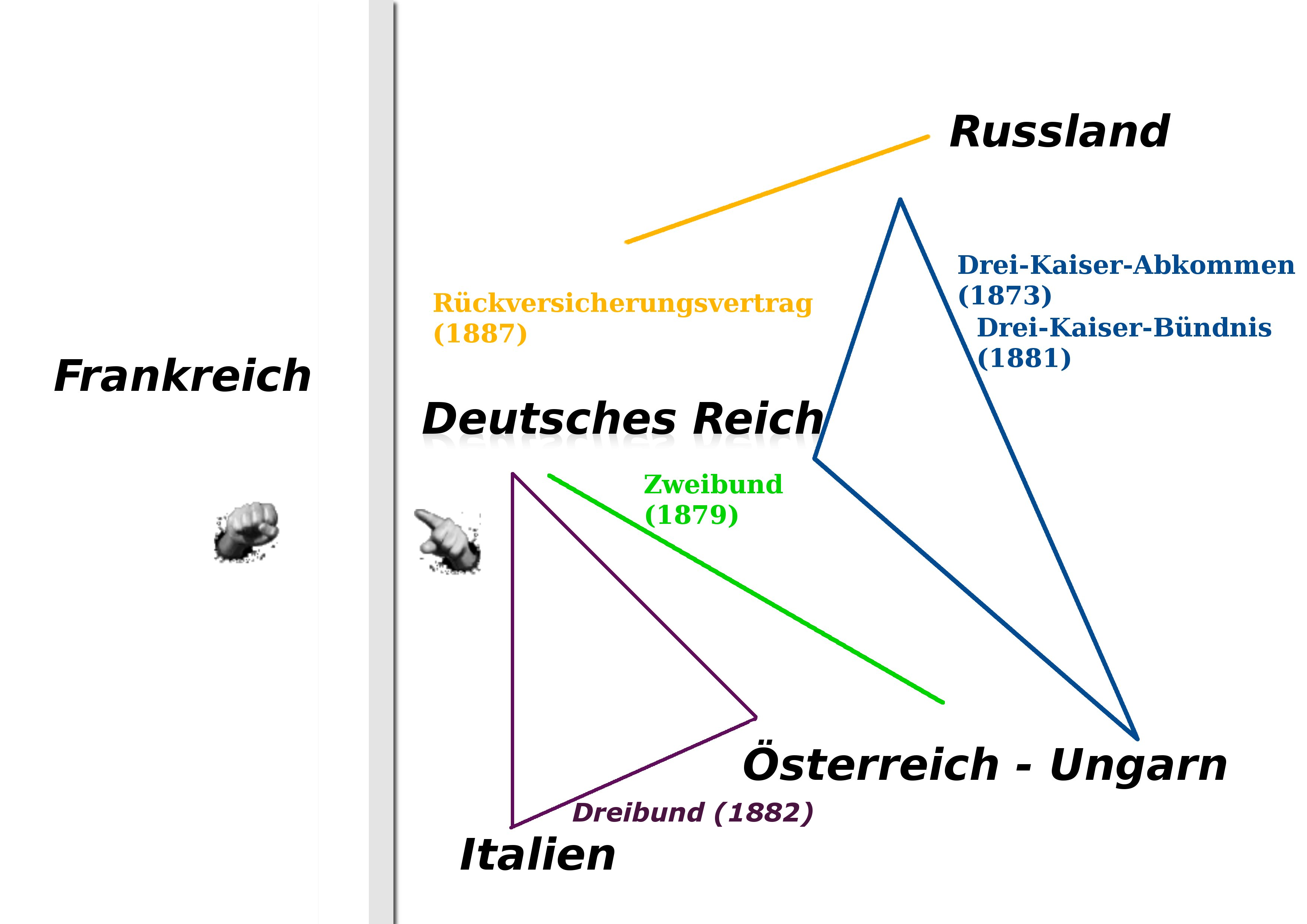 Ein Diagramm zur Darstellung der Bündnispolitik Bismarcks